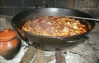 Calandrajos, comida tipica de Jaen